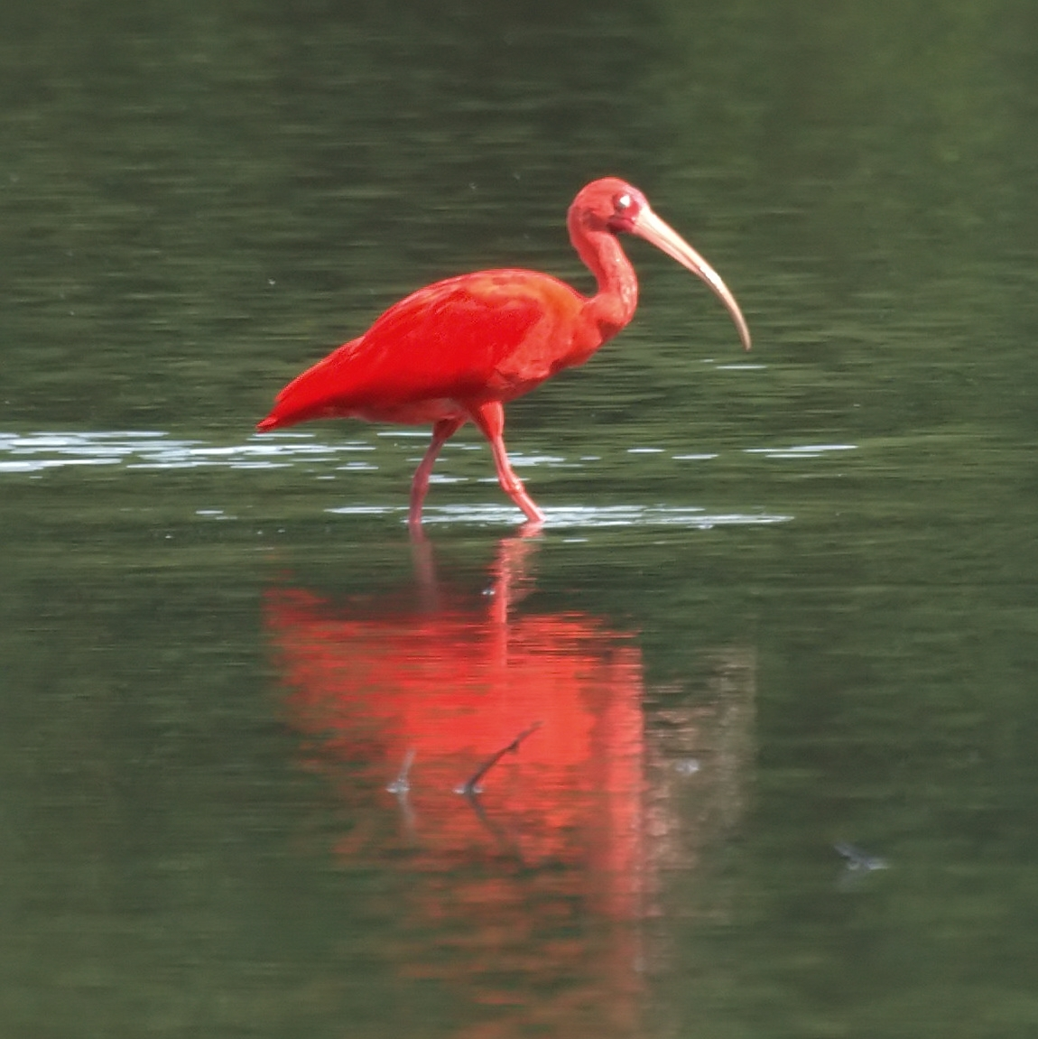 Scarlet Ibis